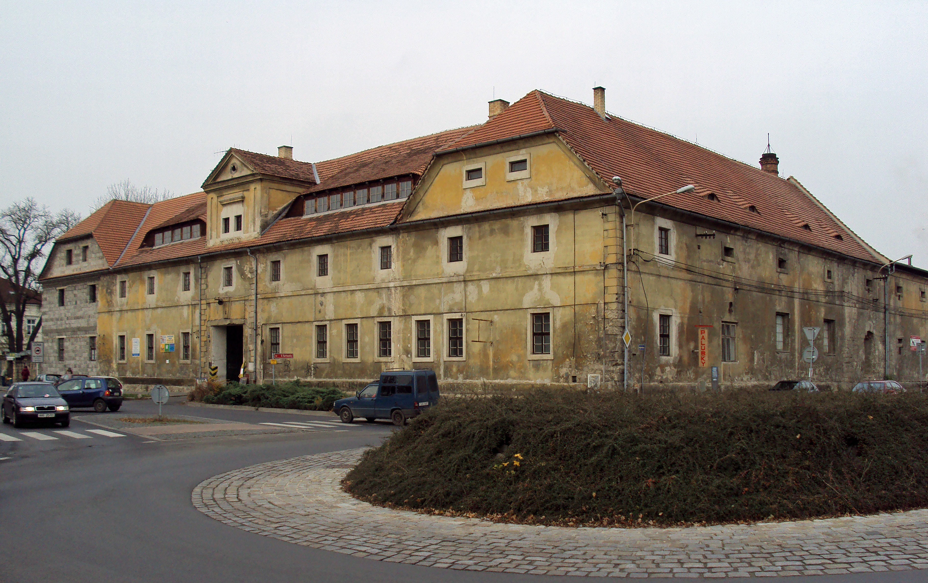 Bývalý pivovar v České Lípě poblíž nemocnice